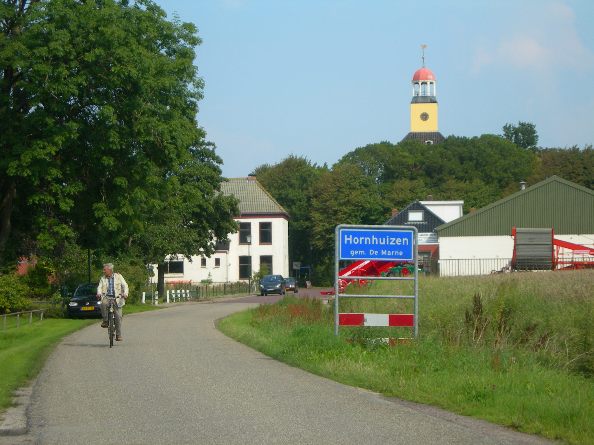 Hornhuizen